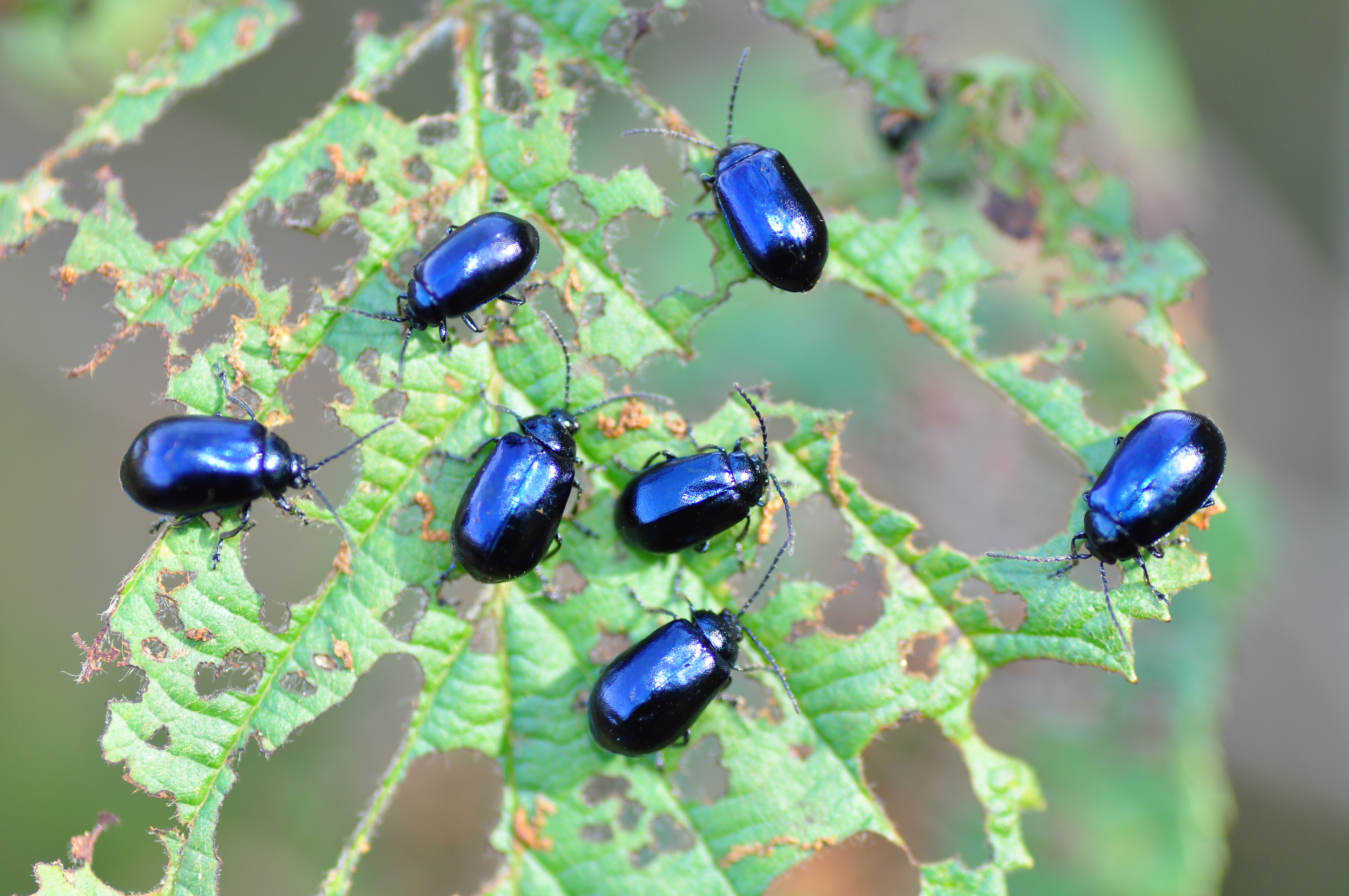 Листоед ольховый